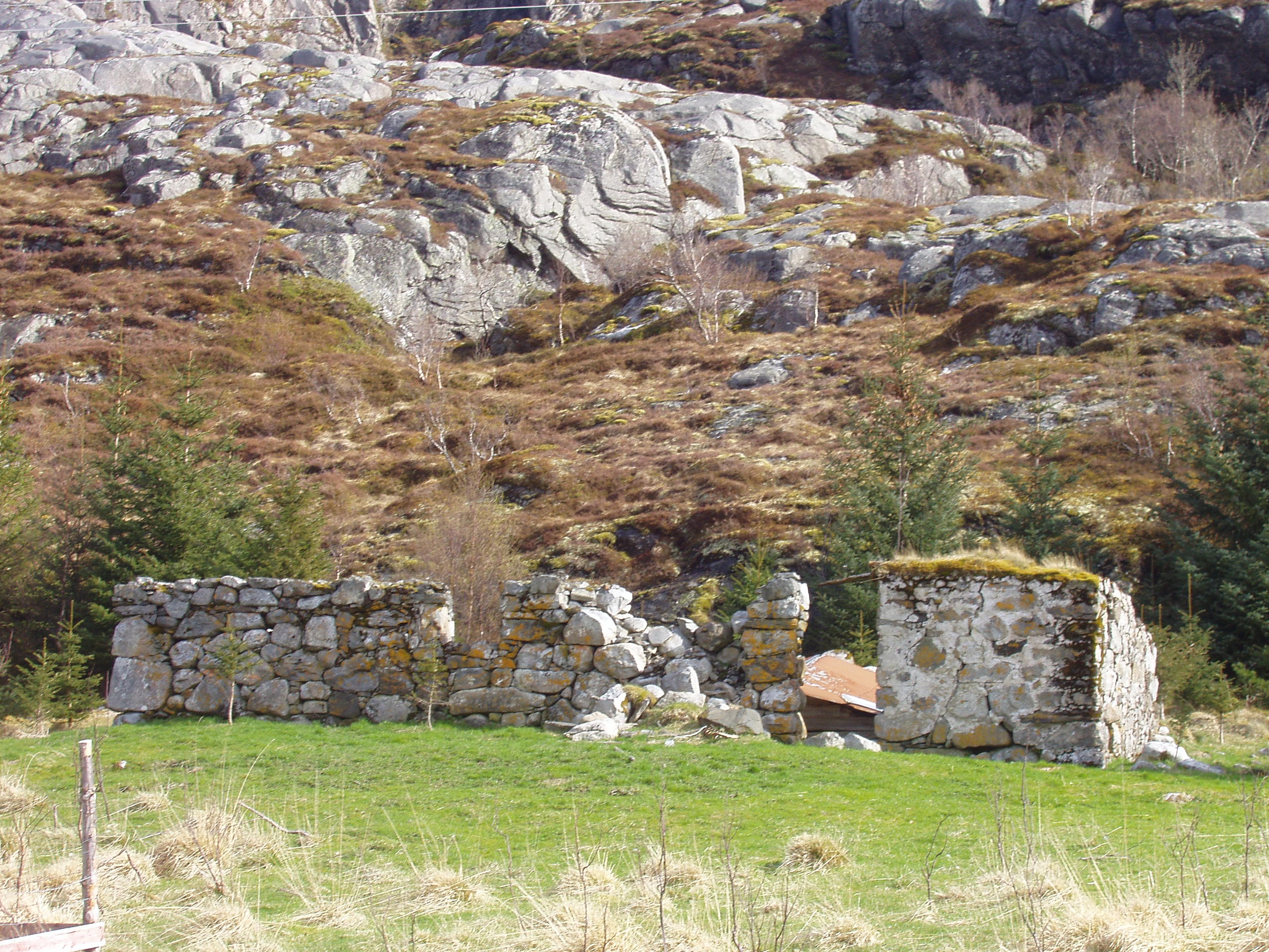 Muren til gammelfjøsen der garden opphaveleg låg.